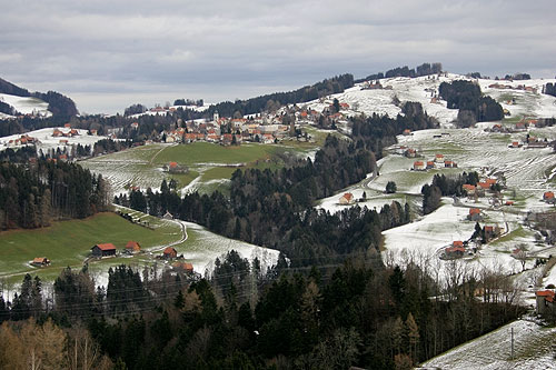 Wald (Appenzell Ausserrhoden)